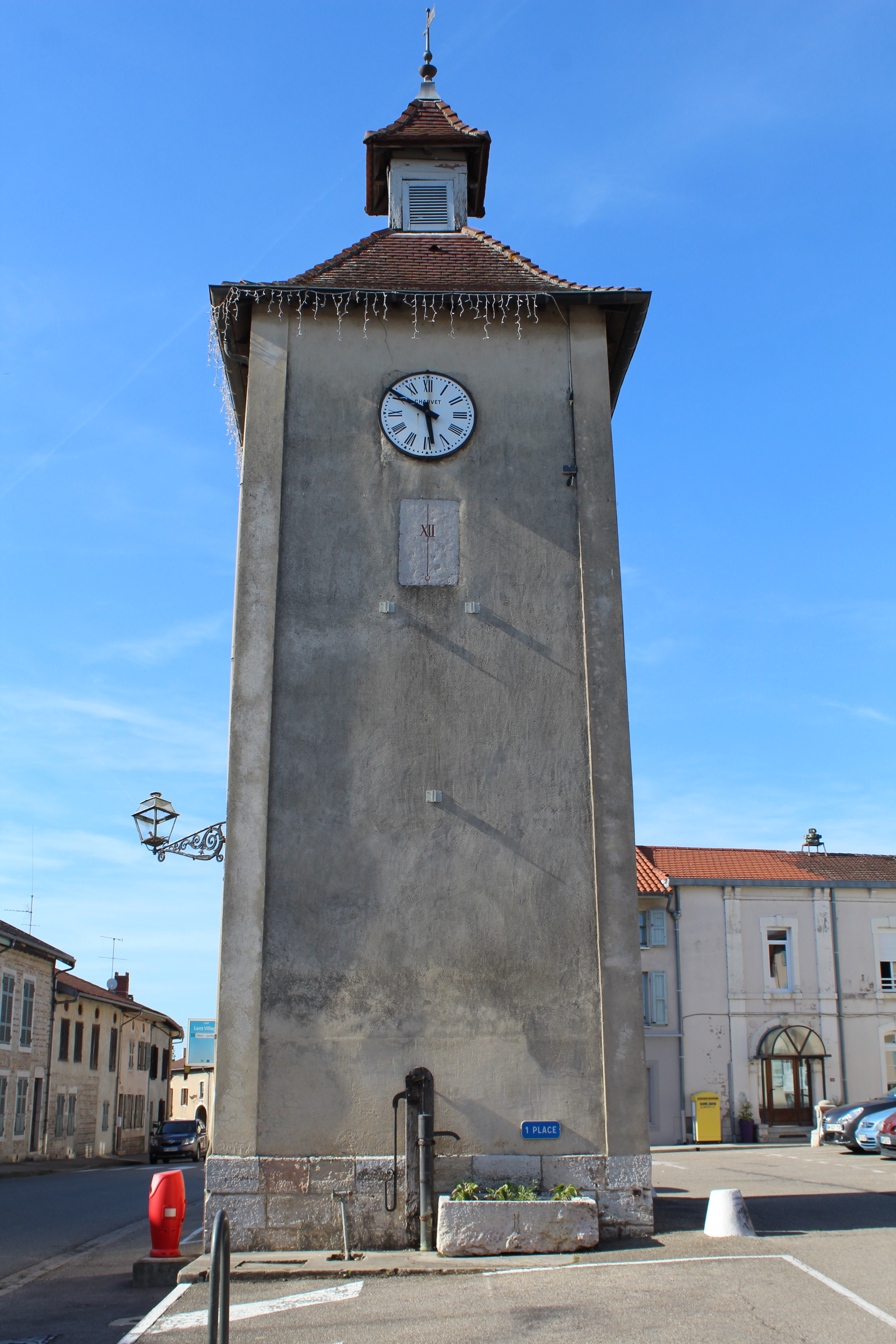 Tour de l'Horloge de Lent, Ain.